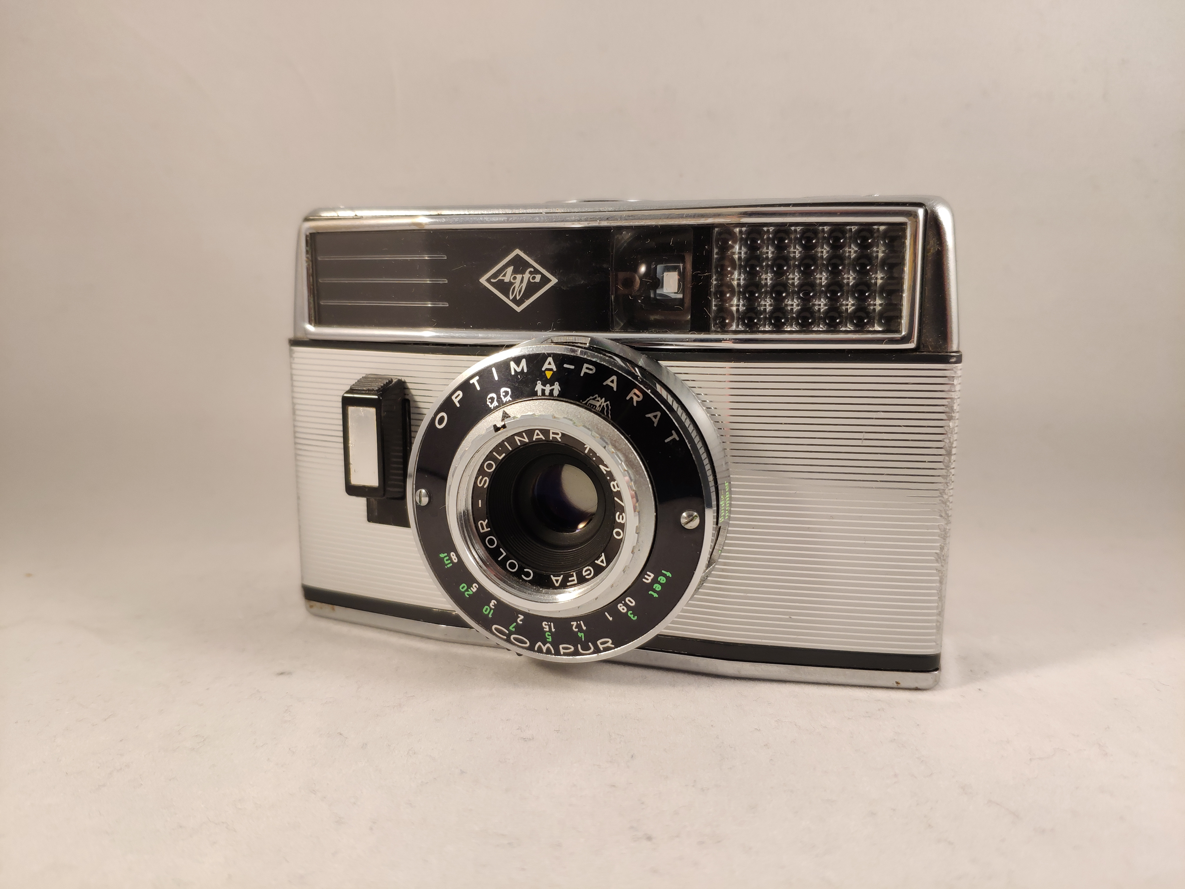 Agfa Optima Parat half frame camera.